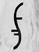 Symbole_Heroes